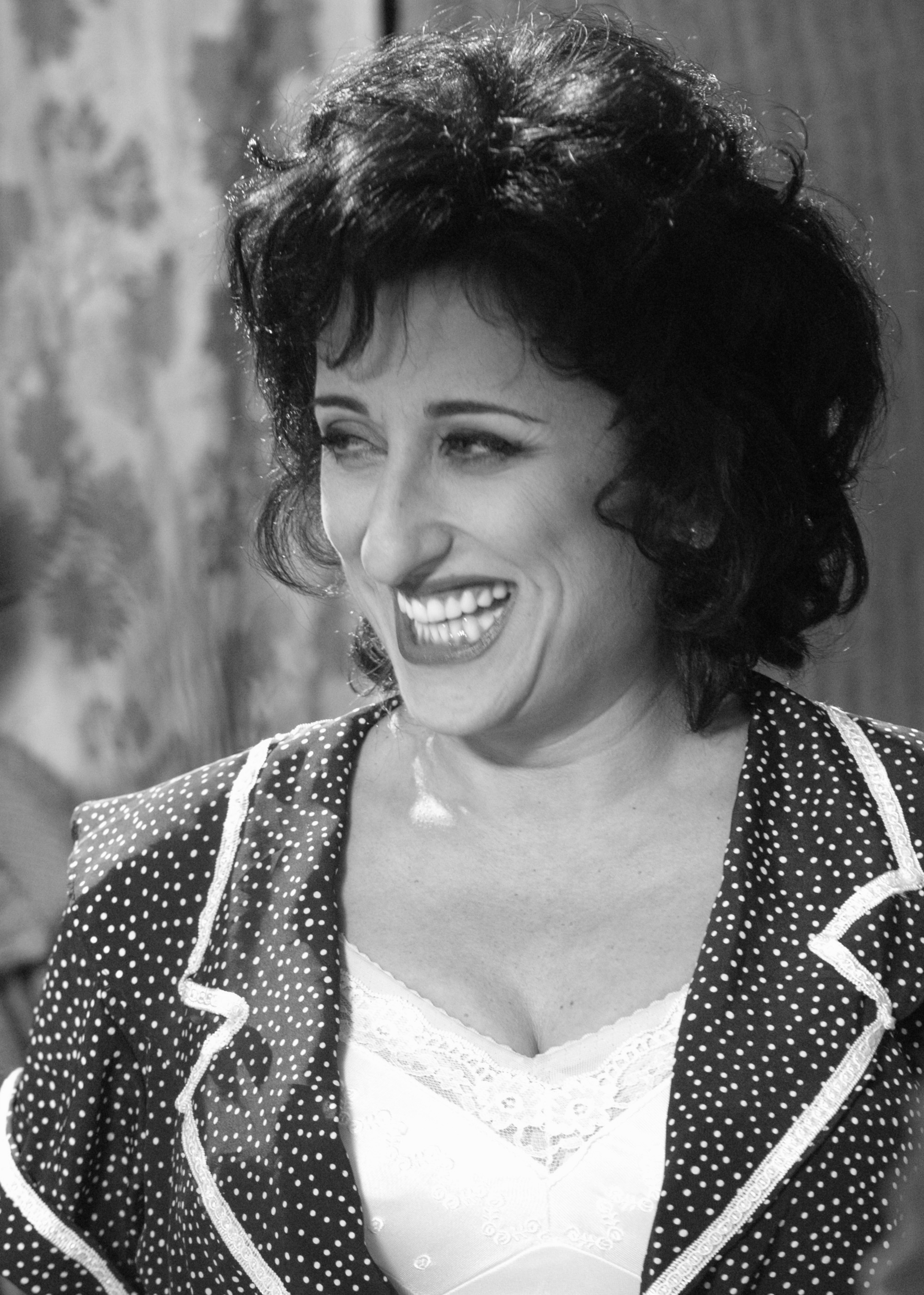 foto luigi giordani